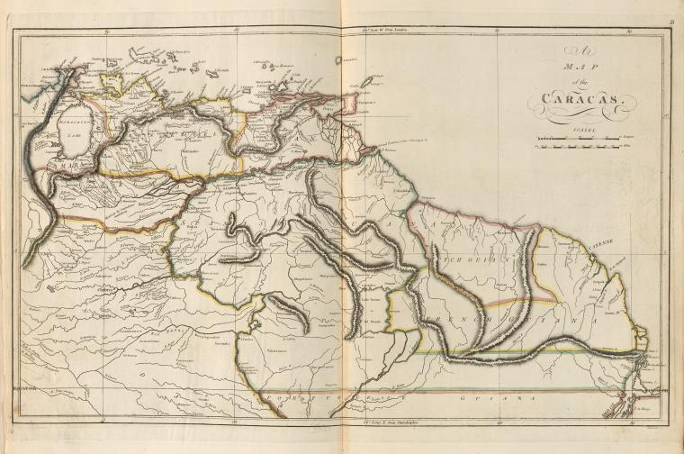 Map of Venezuela